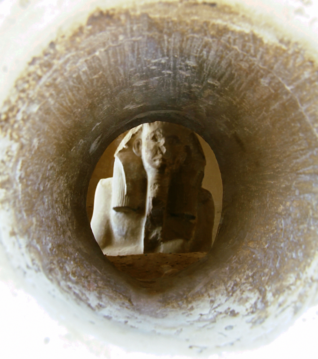 Nekropolia w Sakkarze (Memfis), posąg faraona Dżesera w serdabie piramidy schodkowej. [Memphis nekropolis, Pharaoh Djoser statue in serdab in Djoser pyramid]